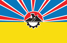 Прапор Красного Луча